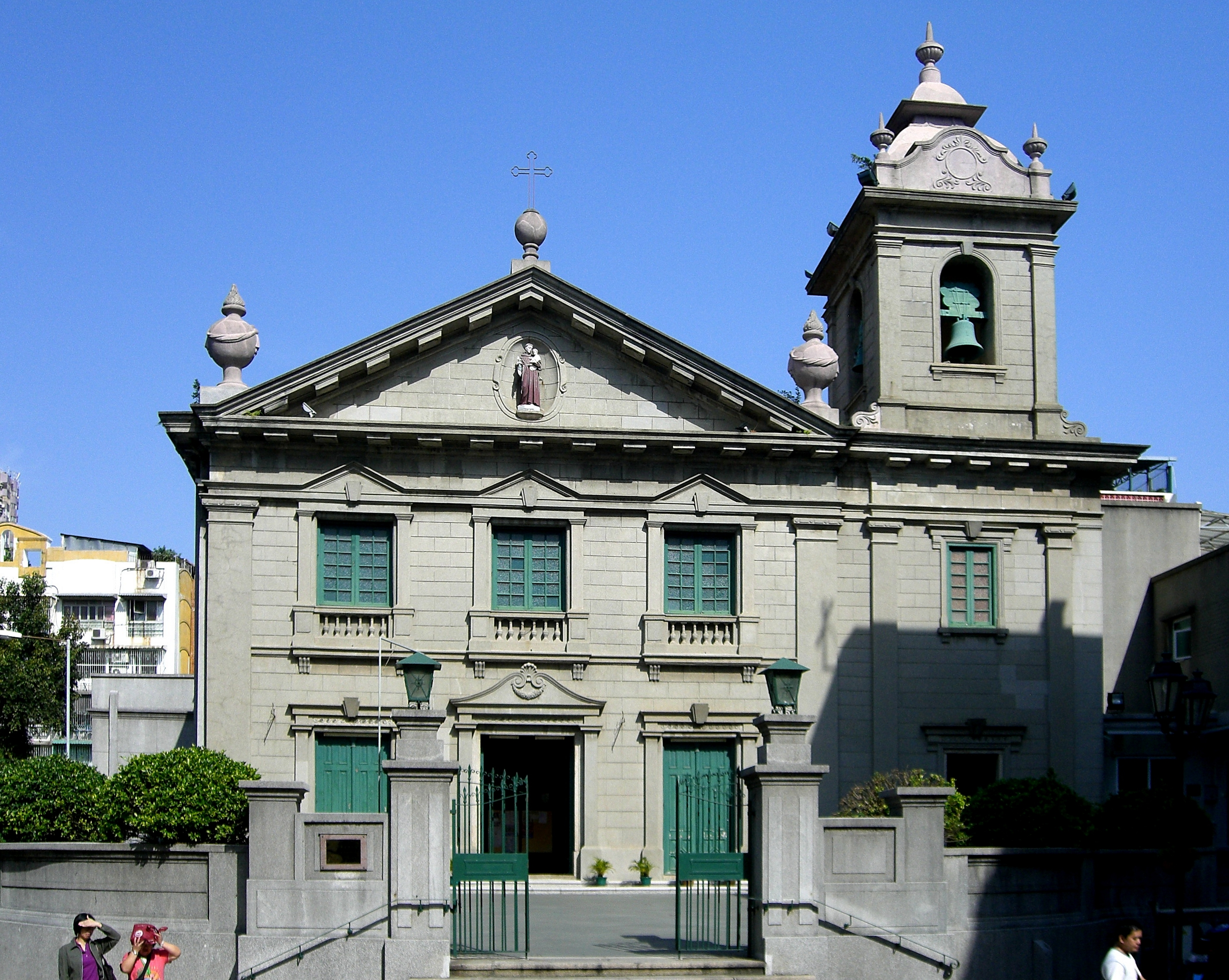 Igreja de São Antonio de Macau